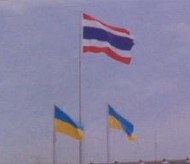 เสาธงโรงเรียนสมุทรปราการ